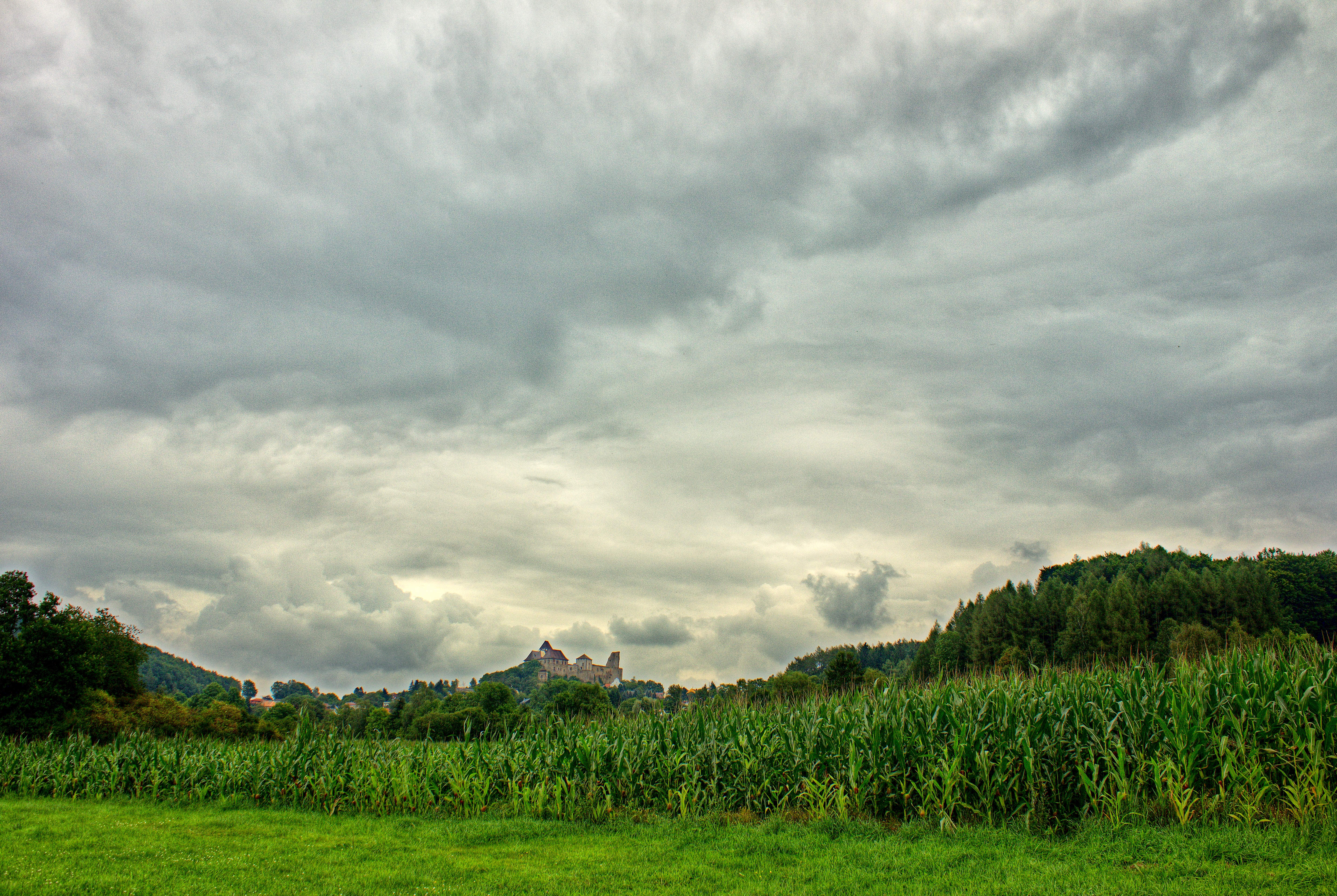 Lipnice nad Sázavou Castle